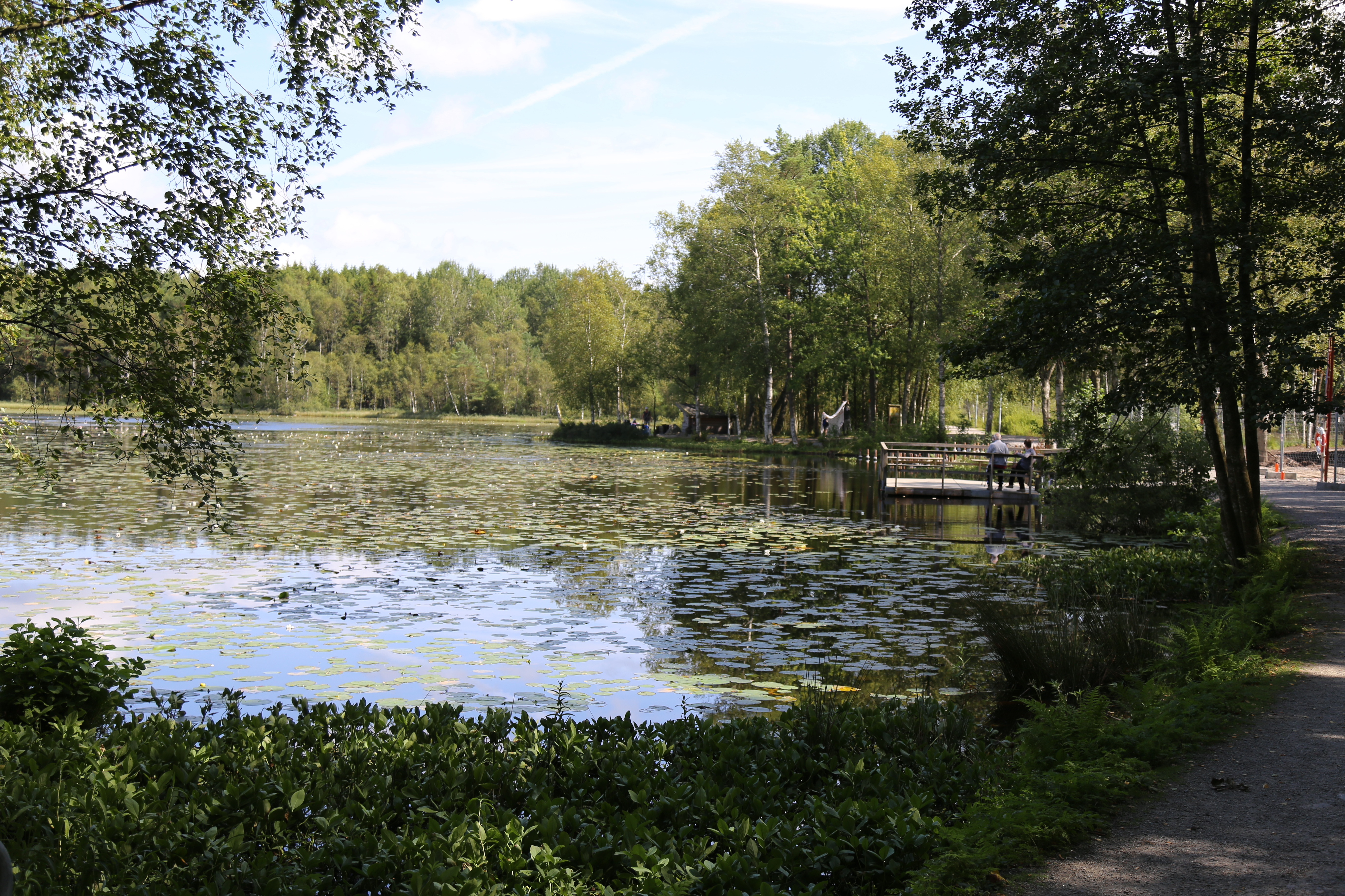 Svarte mosse i Fontins naturreservat i Kungälv.